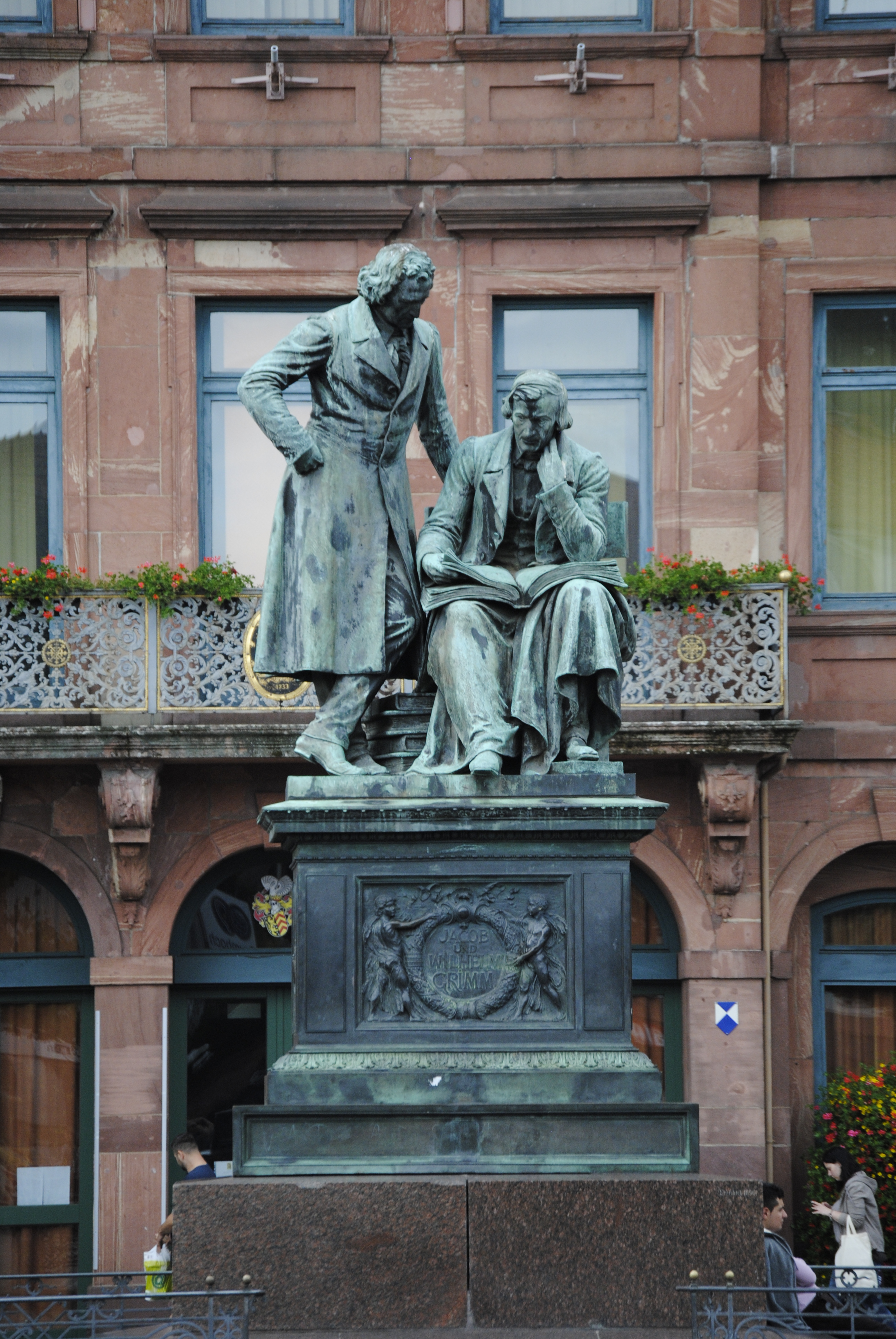 ^Nationaldenkmal für die Gebrüder Grimm in Hanau